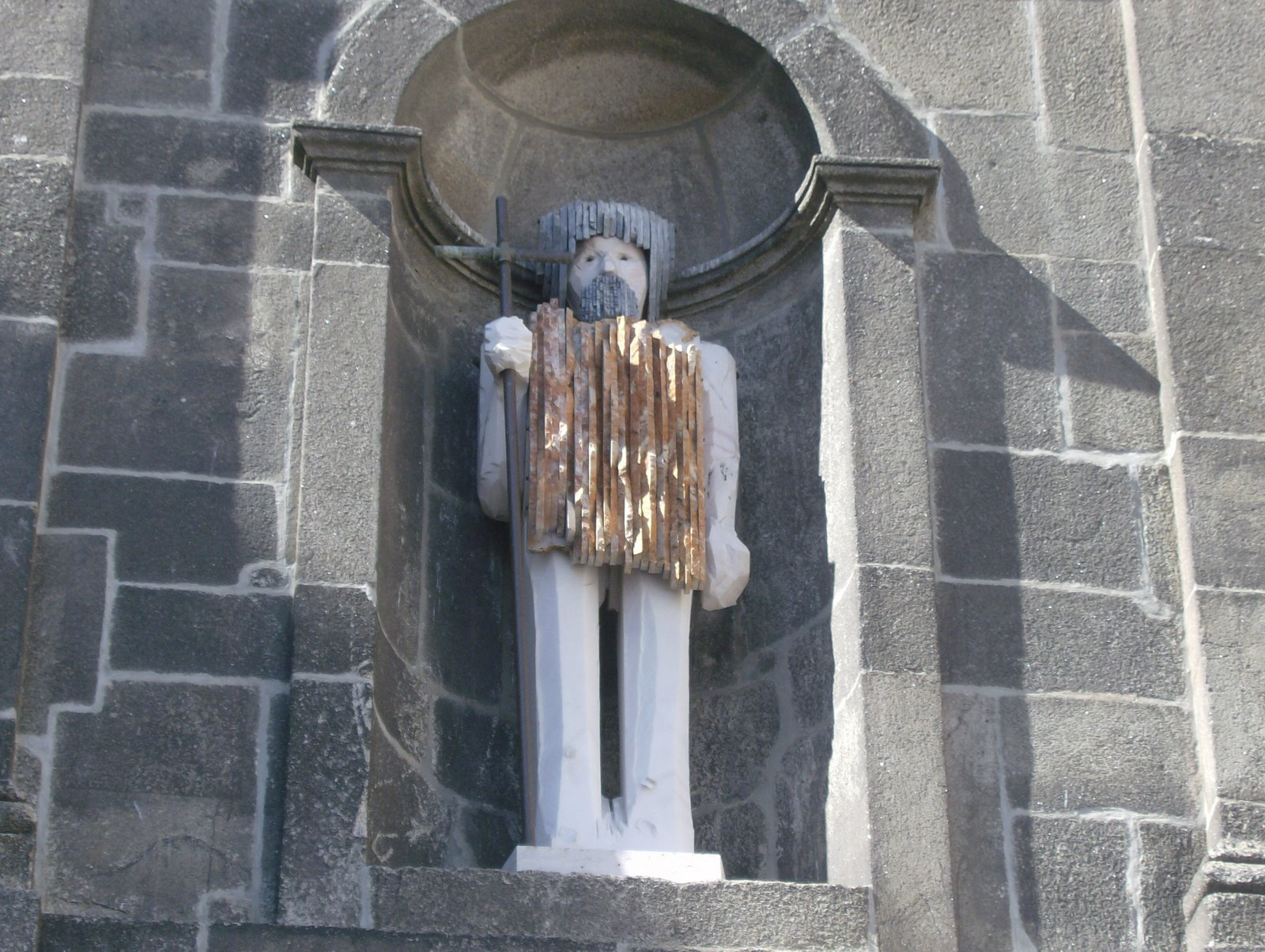 A estátua de São João Baptista, da autoria do escultor João Cutileiro, no nicho da Fonte da Praça da Ribeira,Porto.